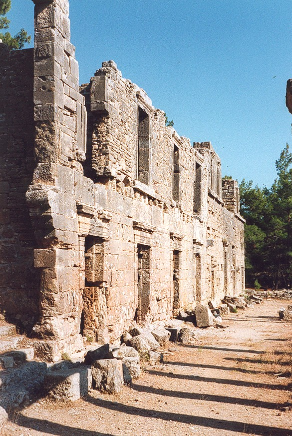 Seleukia - Fassaden der Ladenzeile an der Agora